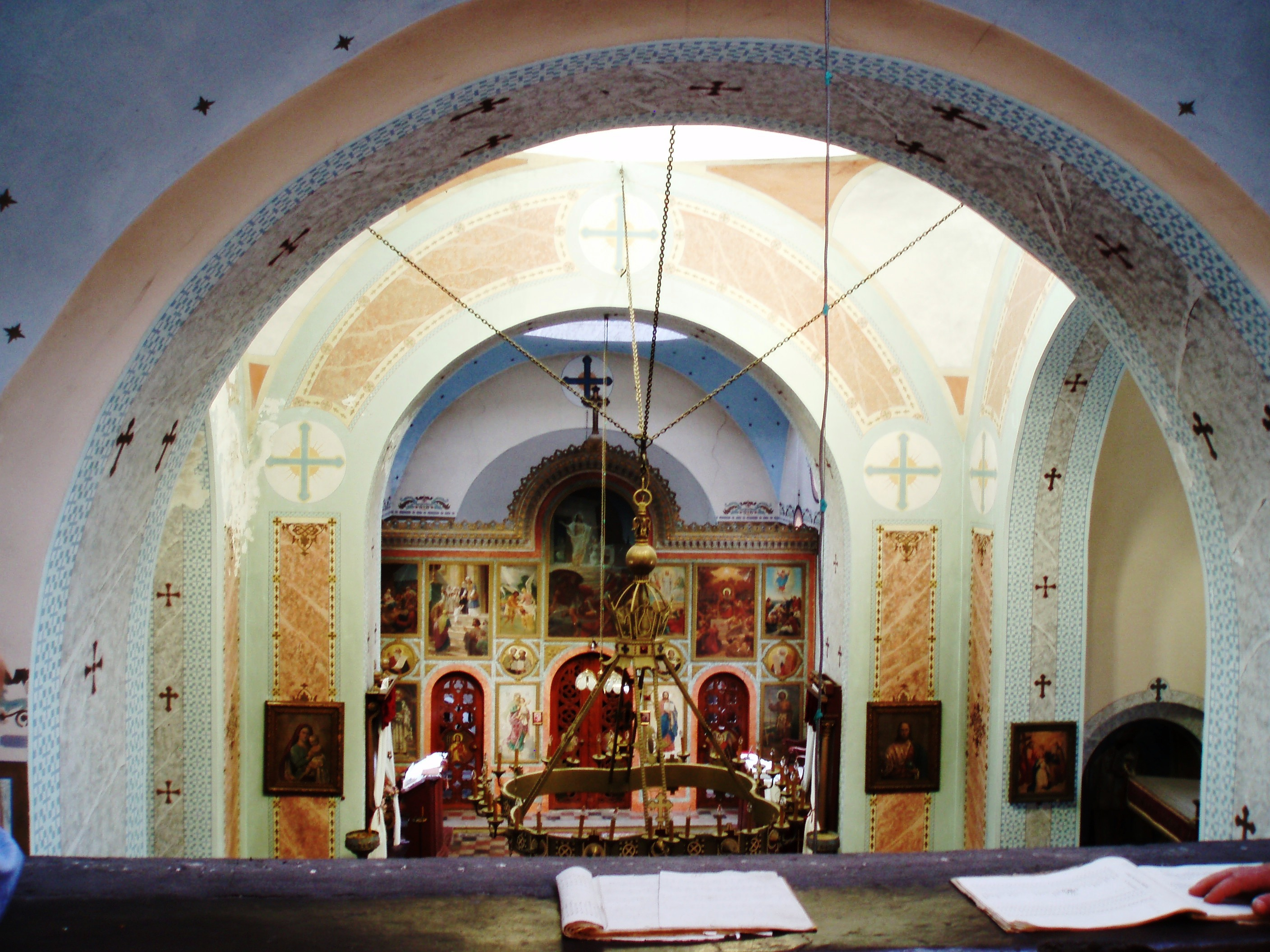 Crkva u Orlovatu, unutrašnjost crkve, arh. D. Brašovan, autor fotografije: Nicolo